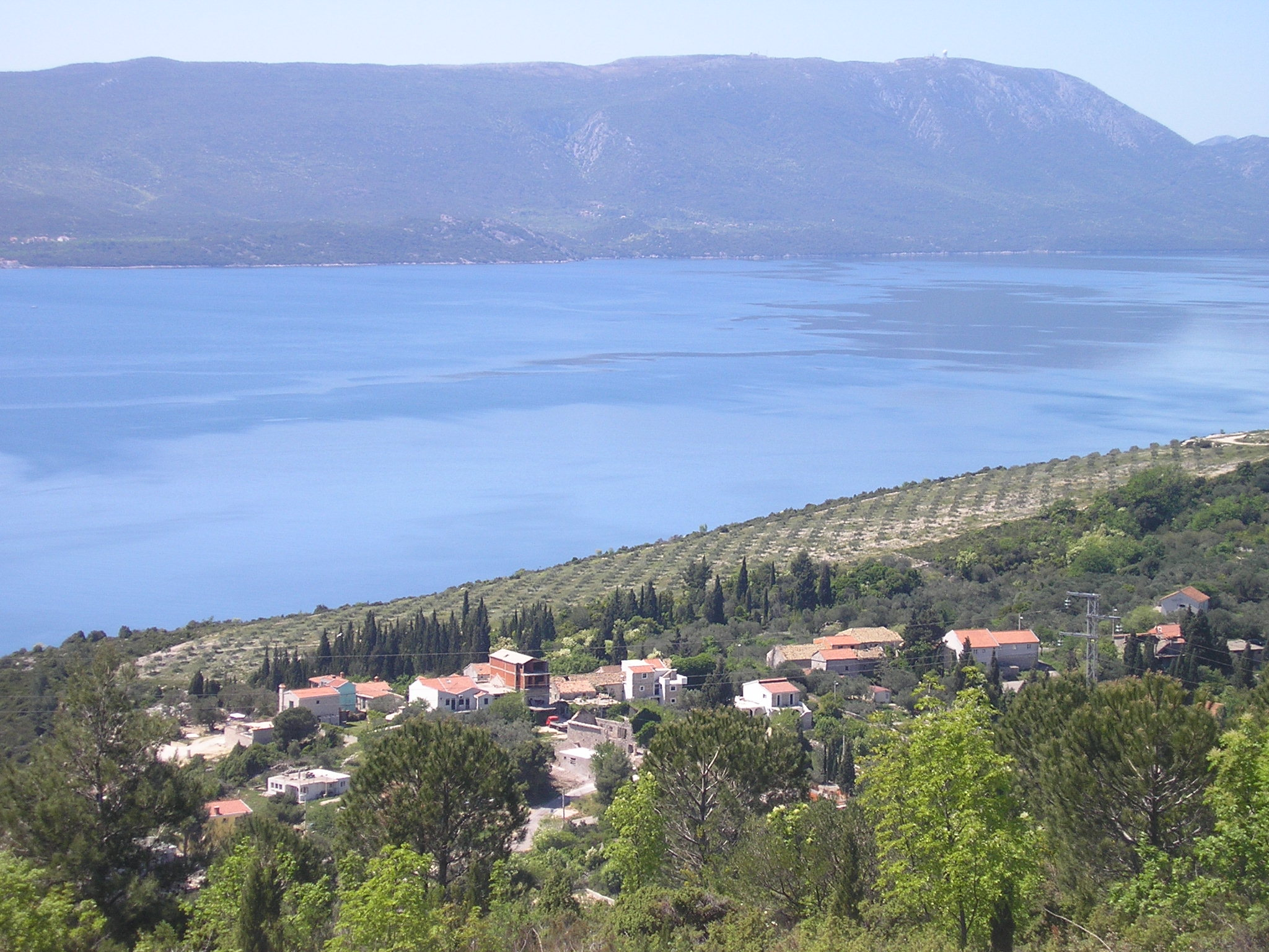 Kremena